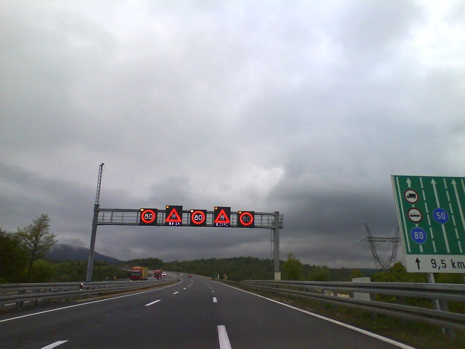 Upozorenja na autocesti A6